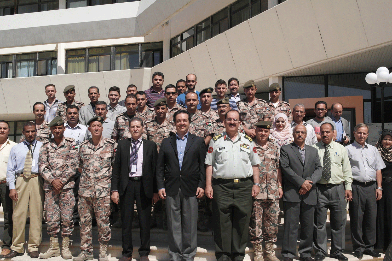 UCSGS